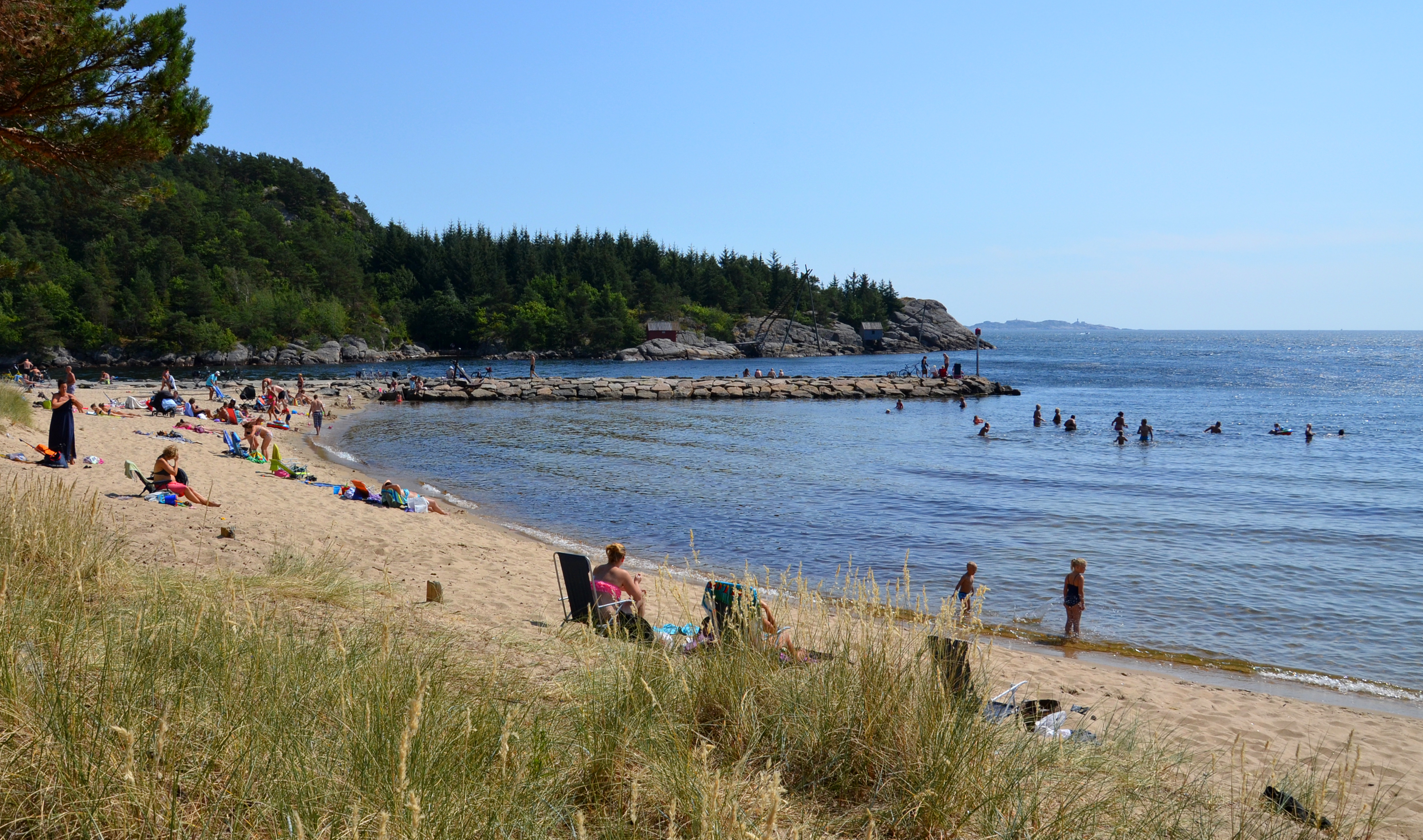 Sjøsanden beach i Mandal